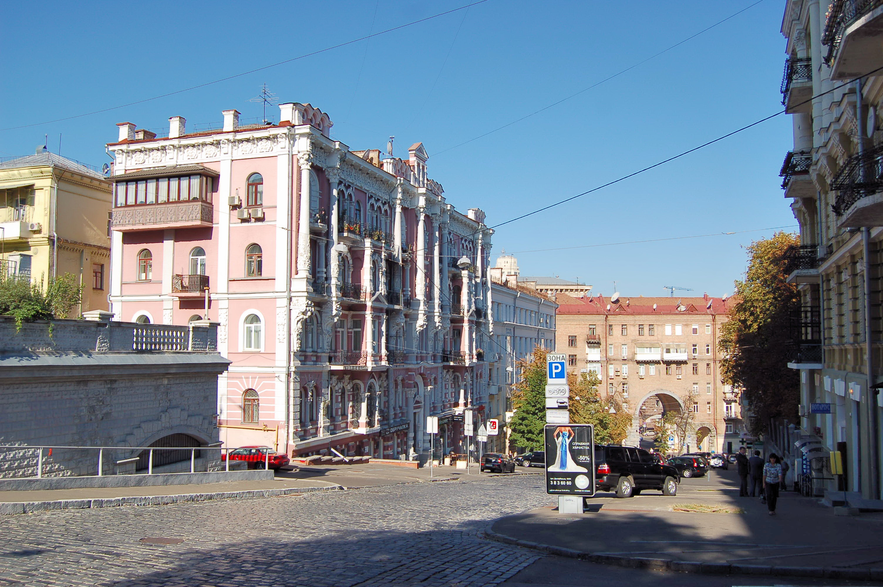 Лютеранська _вулиця у Києві